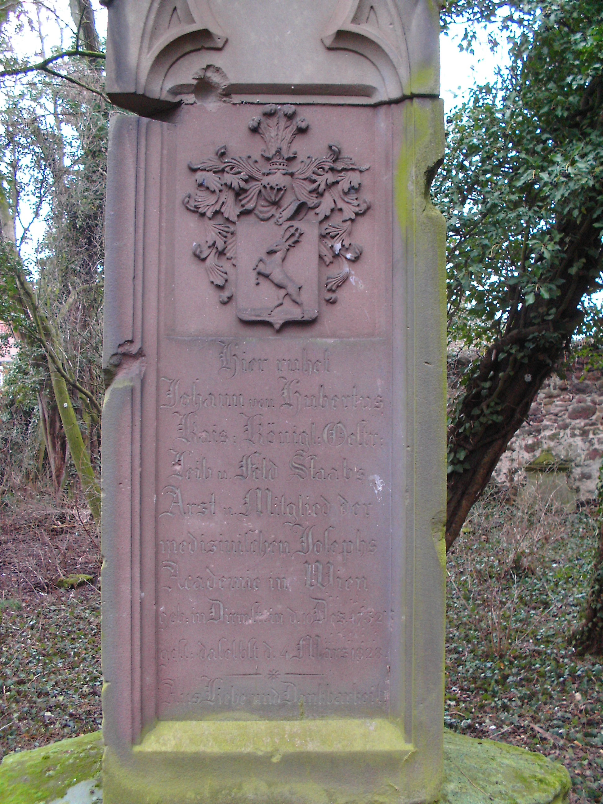 Grabmal Johann Hubertus, Habsburger Leibarzt, Dirmstein